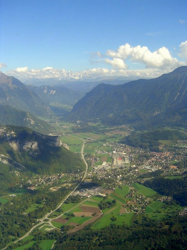 Faverges, Haute-Savoie. Photographie aérienne, prise en direction de l'est. On distingue dans le fond le Mont-Blanc. À gauche, ce sont les pentes du Mont Charvin de la chaîne des Aravis et à droite, celles de la Dent de Cons du massif des Bauges.